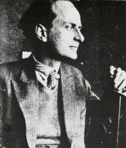 Henri Bruning (1900-1983) was een Nederlands dichter en schrijver, actief voor Verdinaso en NSB.